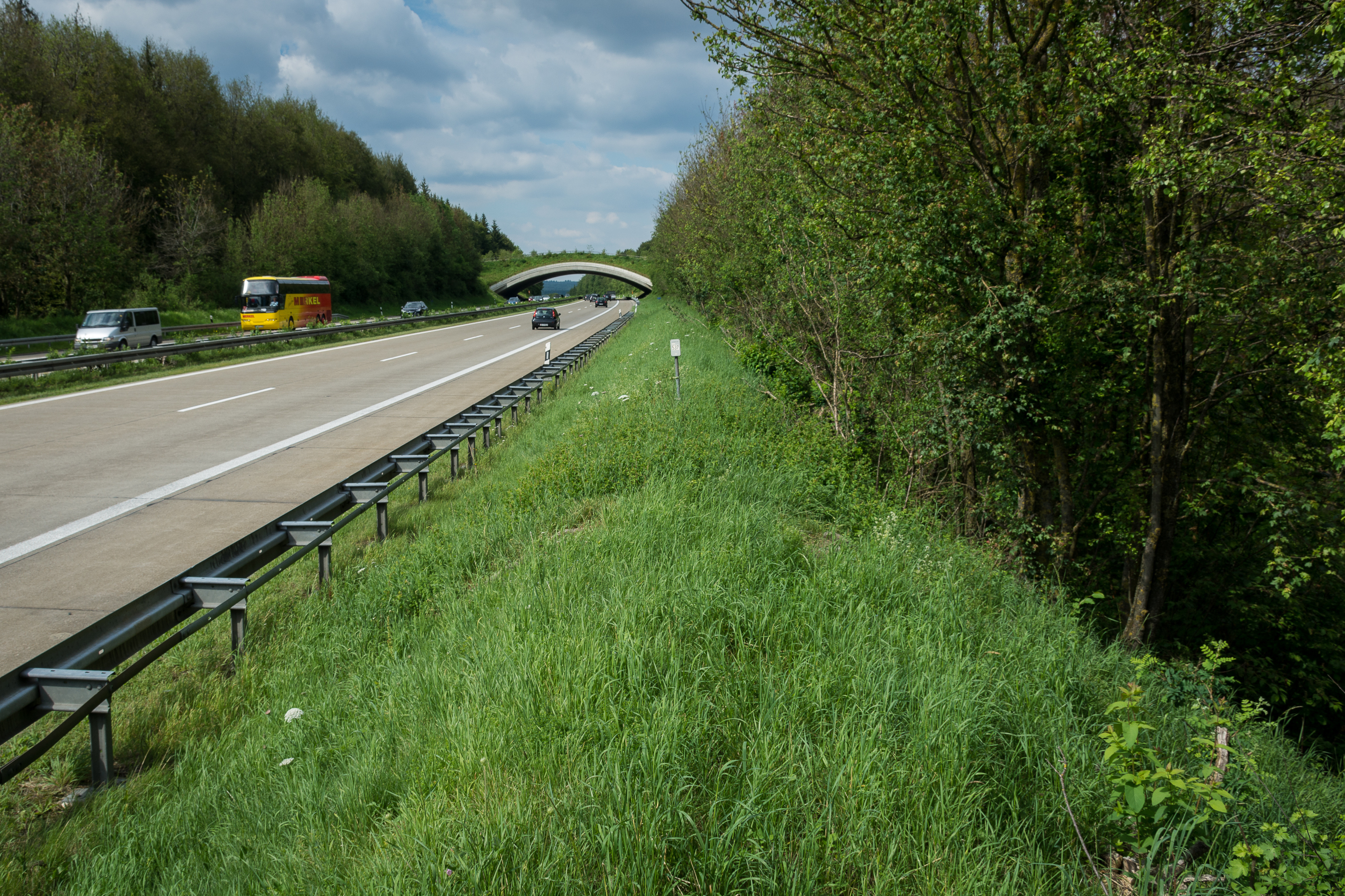 Mordfall Maria Bögerl, Ablegeort des Lösegeldes (Bildmitte) an der A 7, Autobahnkilometer 795, Fahrtrichtung Norden.